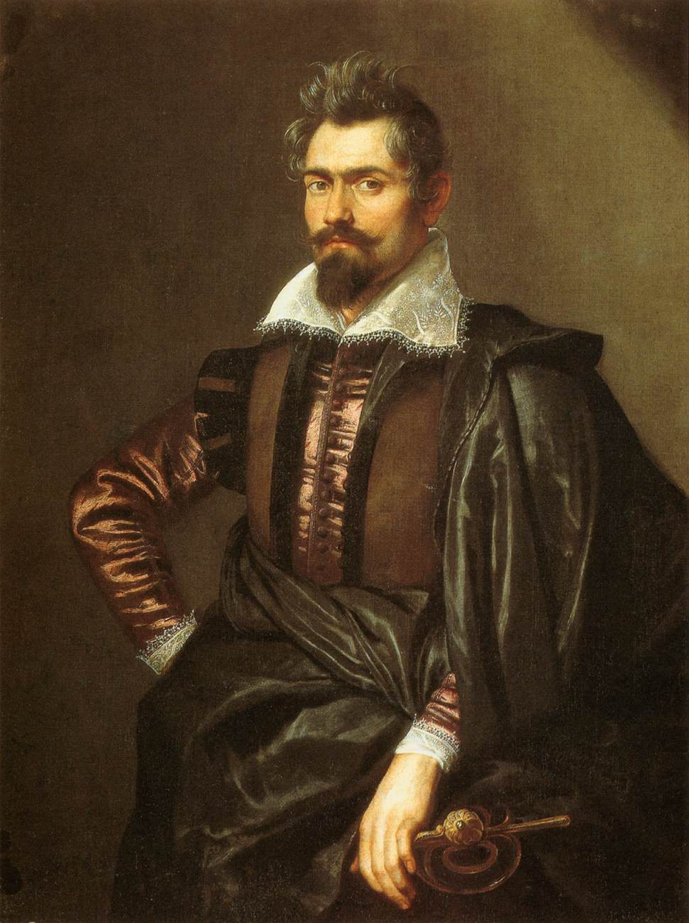 Portrait des Kaspar Schoppe, Gemälde von Peter Paul Rubens, um 1606, Öl auf Leinwand, 116 x 88 cm Galleria Palatina (Palazzo Pitti), Florenz